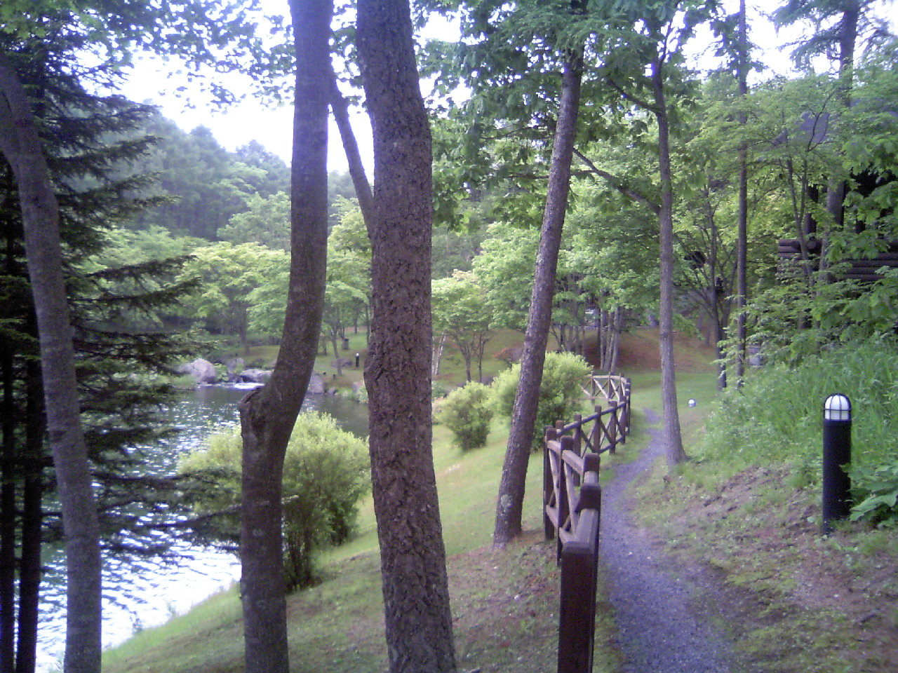 ホテルニドム